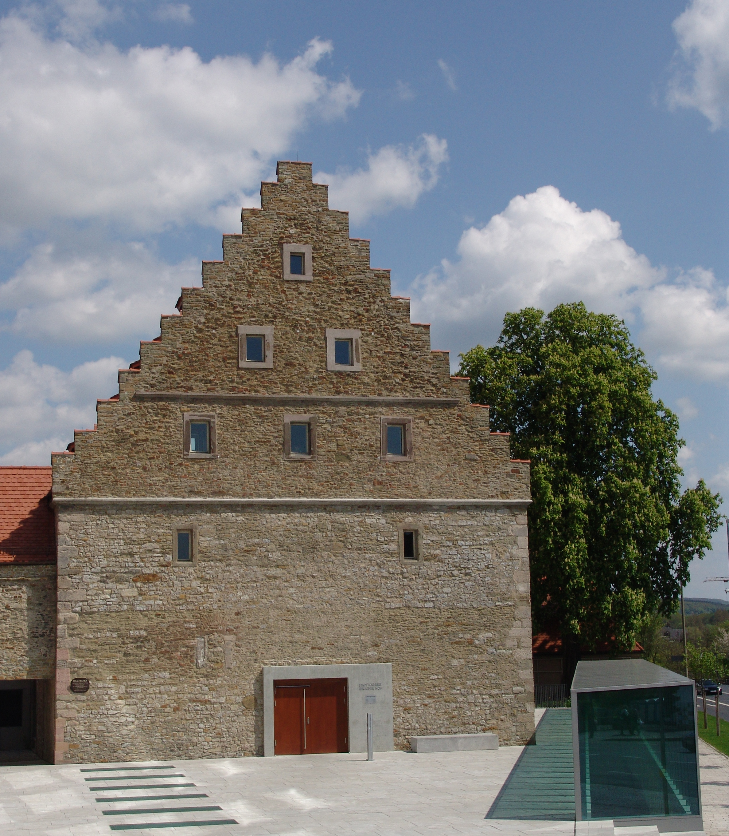 Ebracher Hof